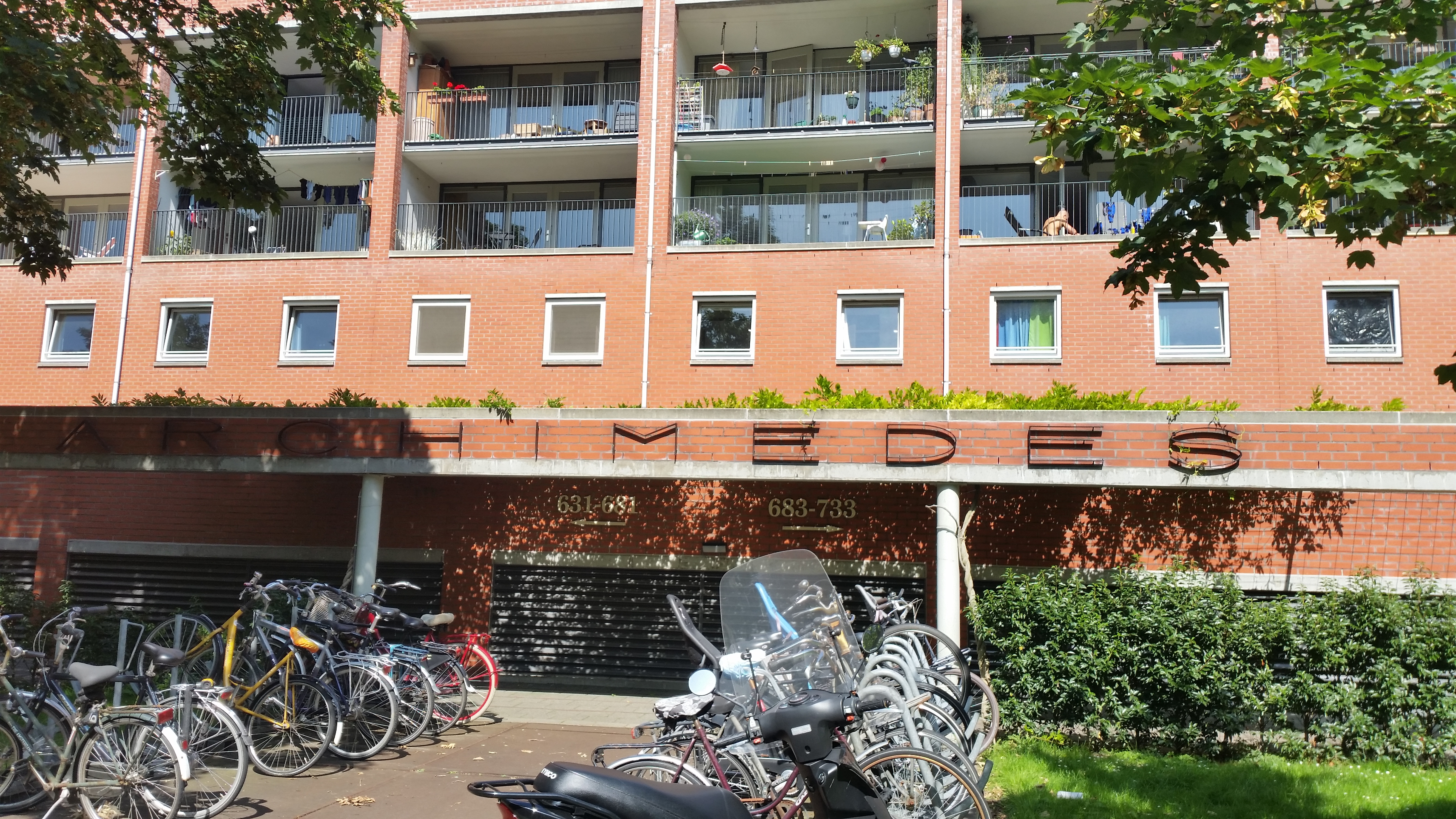 Gebouw Archimedes aan KNSM-laan, Amsterdam